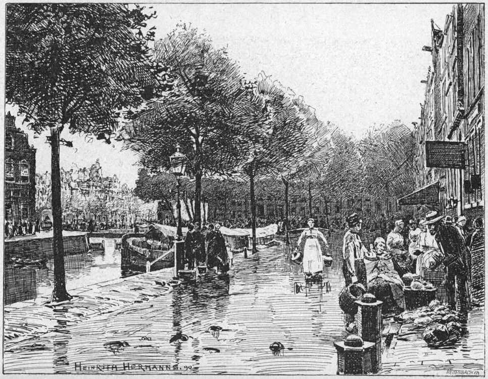 Dordrecht